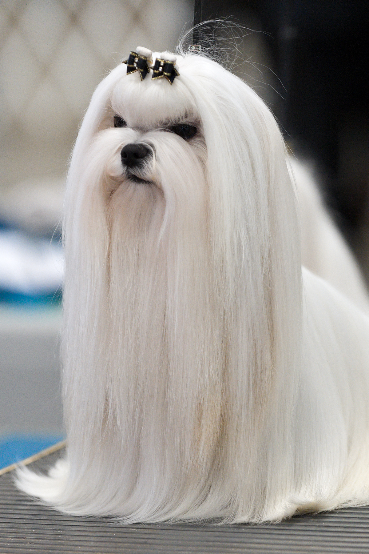 Maltese